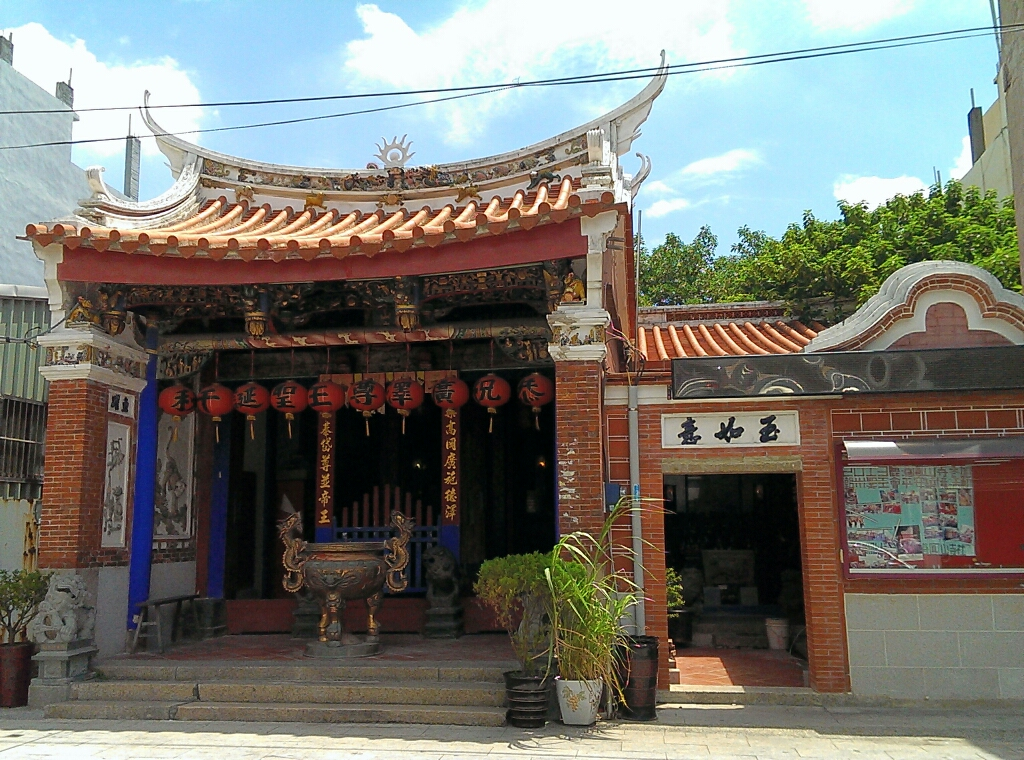 鹿港鳳山寺